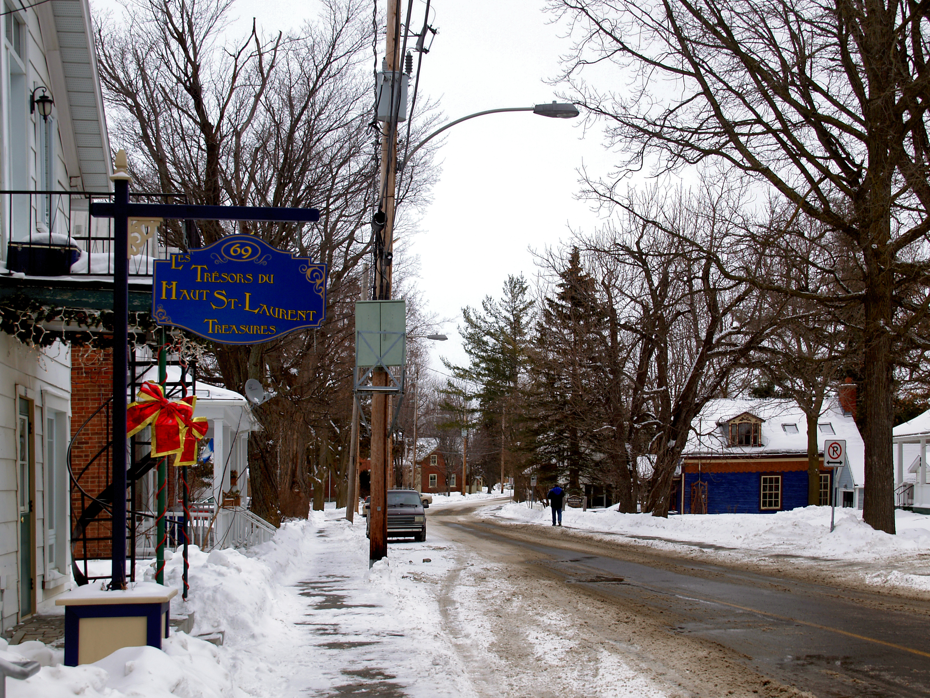 Ormstown, Montérégie (Québec) - La rue Lambton en plein hiver